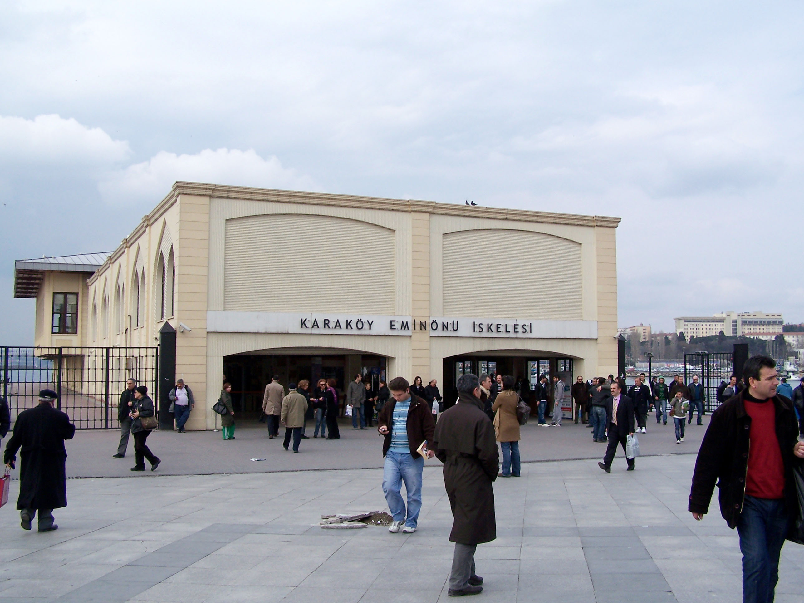 Karaköy, Eminönü İskelesi in Kadıköy, İstanbul, Turkey